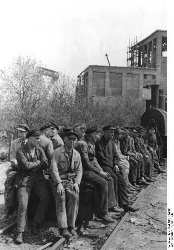 Hamburg, Sitzstreik bei Blohm und Voss Zentralbild-dpd 7.5.1947 Sitzstreik bei Blohm und Voss in Hamburg 1947 Die Belegschaft der Schiffwerft Blohm und Voss in Hamburg trat am Mittag des 7.5.1947 in den Sitzstreik, um auf diese Weise gegen die kritische Ernährungslage zu protestieren. Eine Betriebsdelegation hat die Forderungen der Werftarbeiter u.a. für eine Gross-Hamburger Protestdemonstration dem Ortsausschuss der Gewerkschaften übermittelt. U.B.z.: Arbeiter der Schiffswerft Blohm und Voss während des Sitzstreiks an den Arbeitsplätzen. 548-47